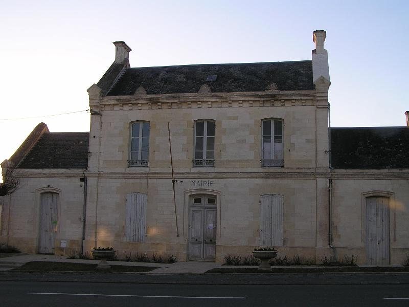 église d'Asnières-la-Giraud